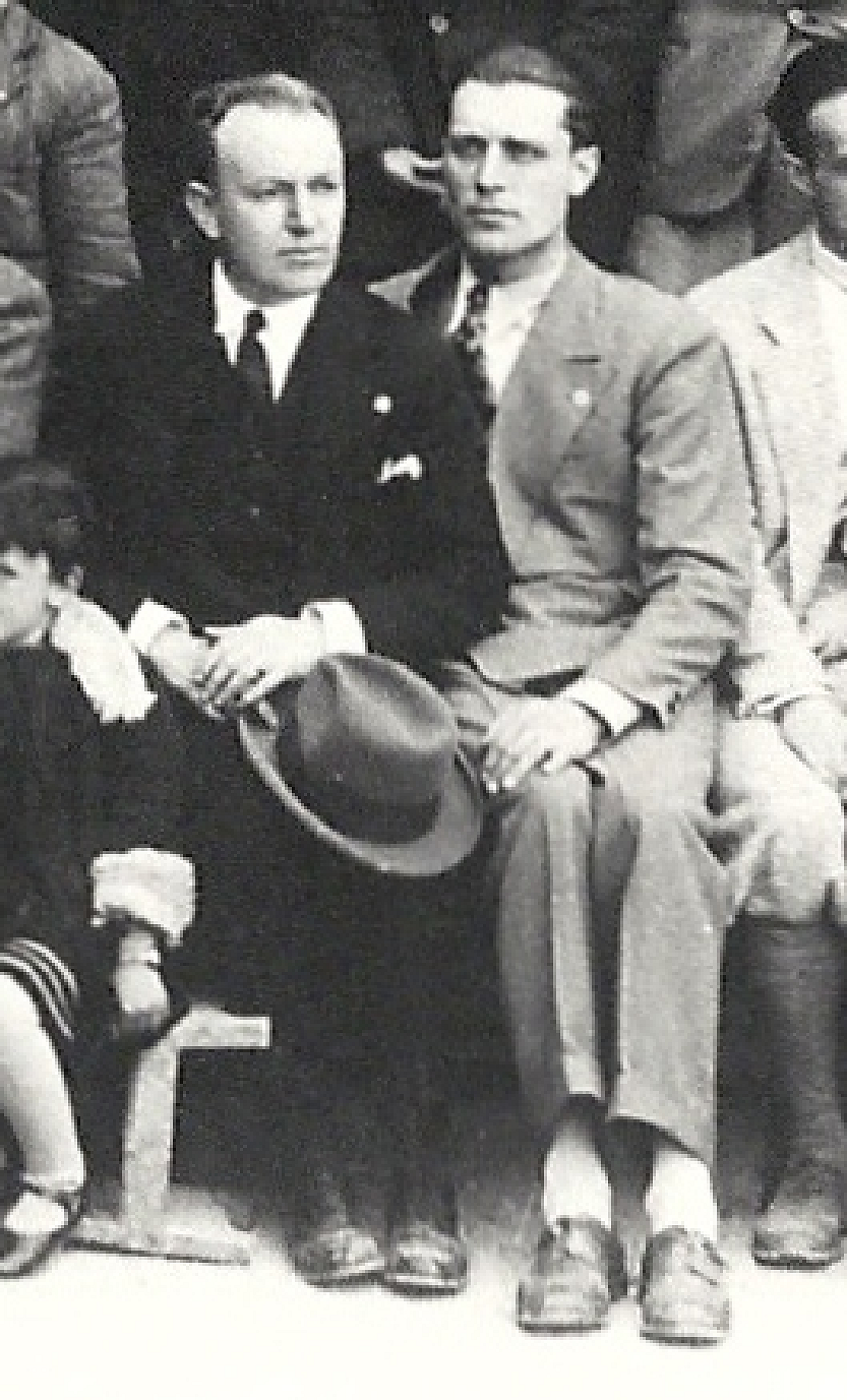 Giuseppe e Lucio Lozza nel 1930